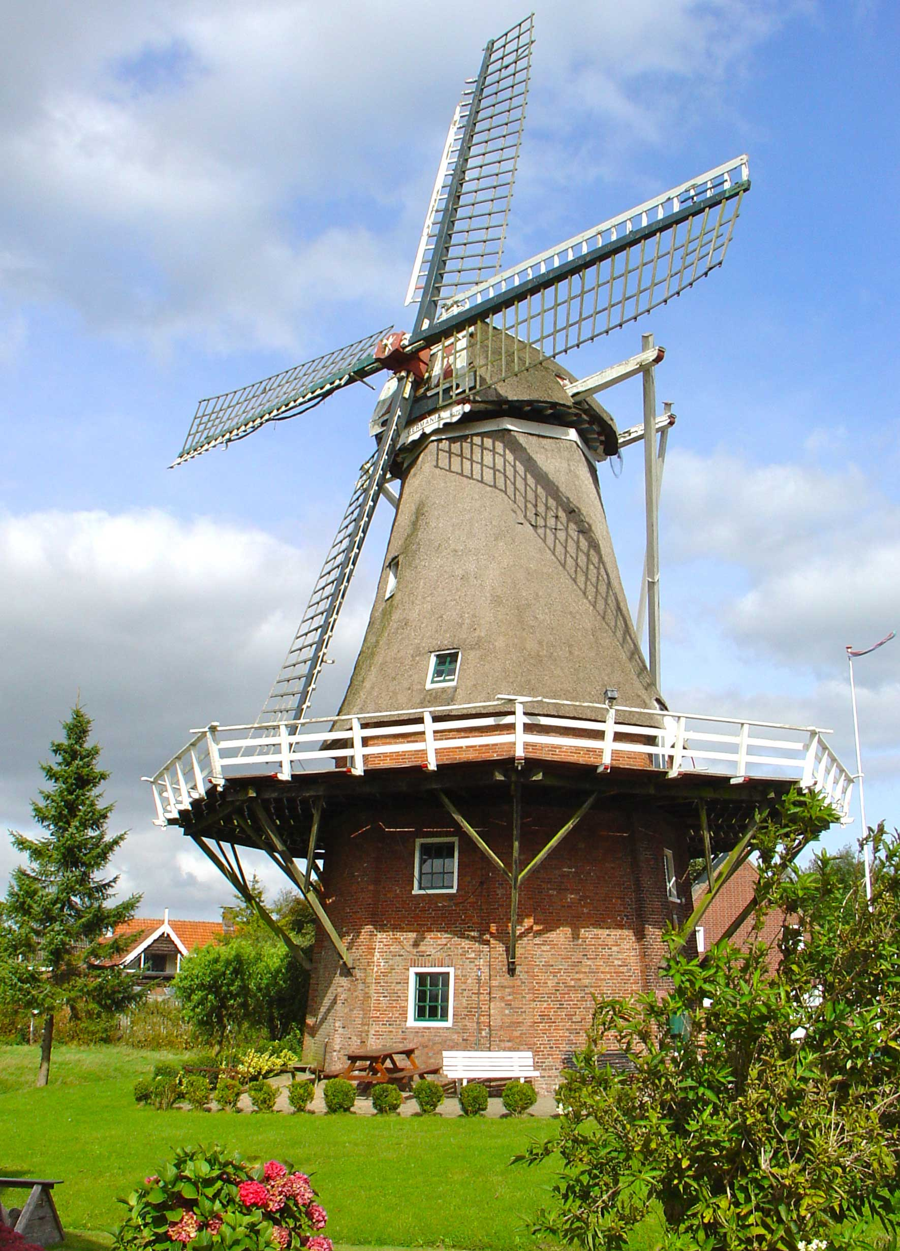 Molen Germanina in Thesinge